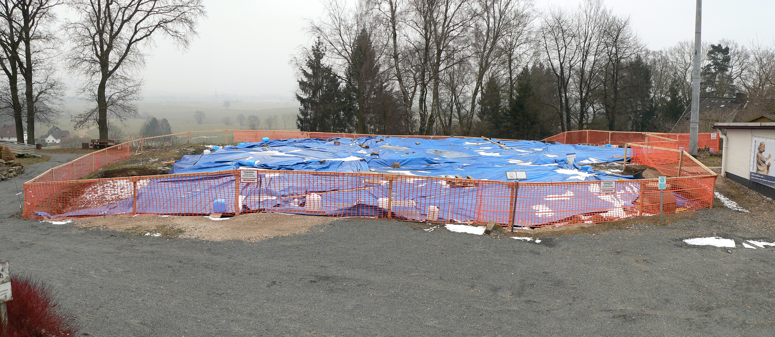 Winterabdeckung der Ausgrabungsstelle Glashütte Klein Süntel